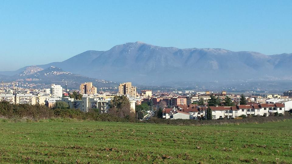 visuale dal prato di collefiorito